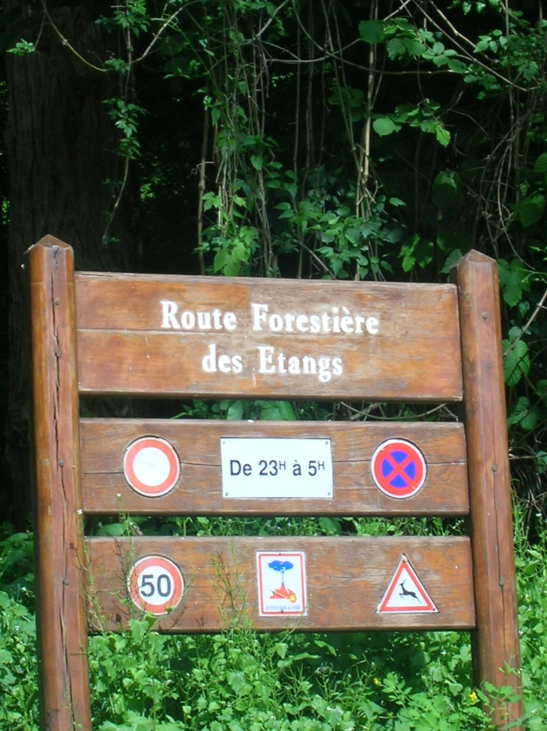 Route reliant Coye-la-Forêt au domaine des Étangs de Commelles